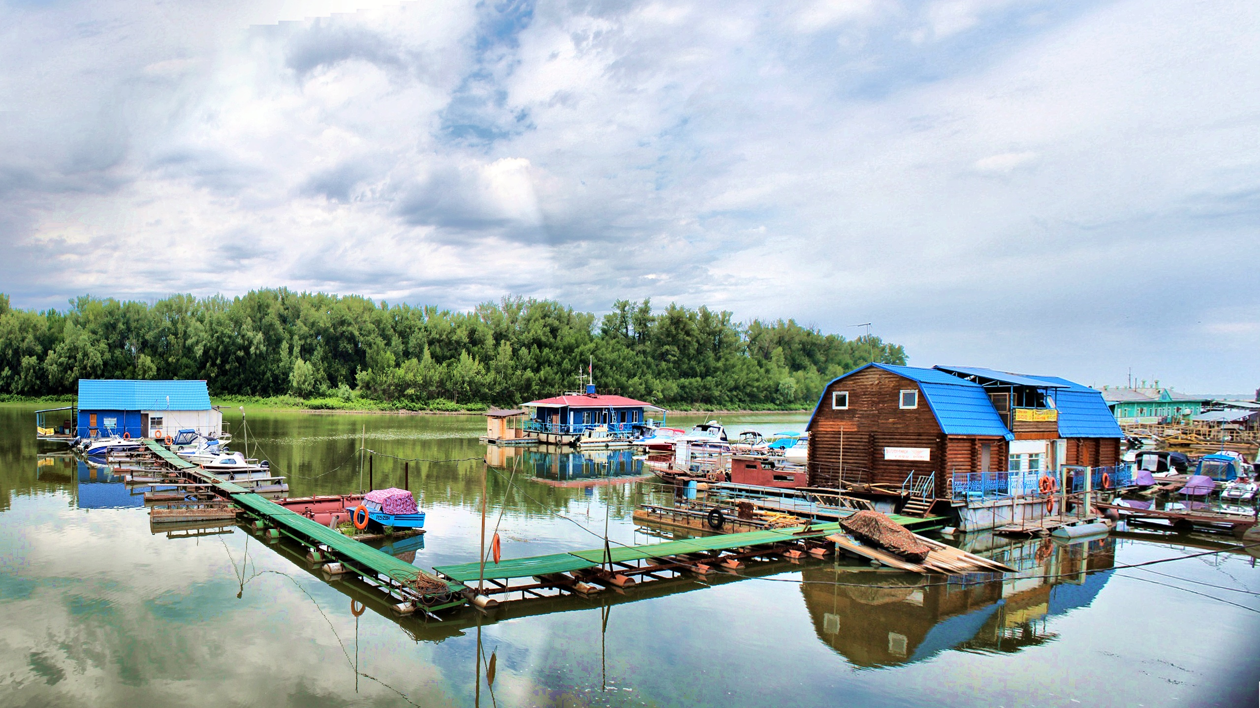 Красноармейский Район - Волгоград